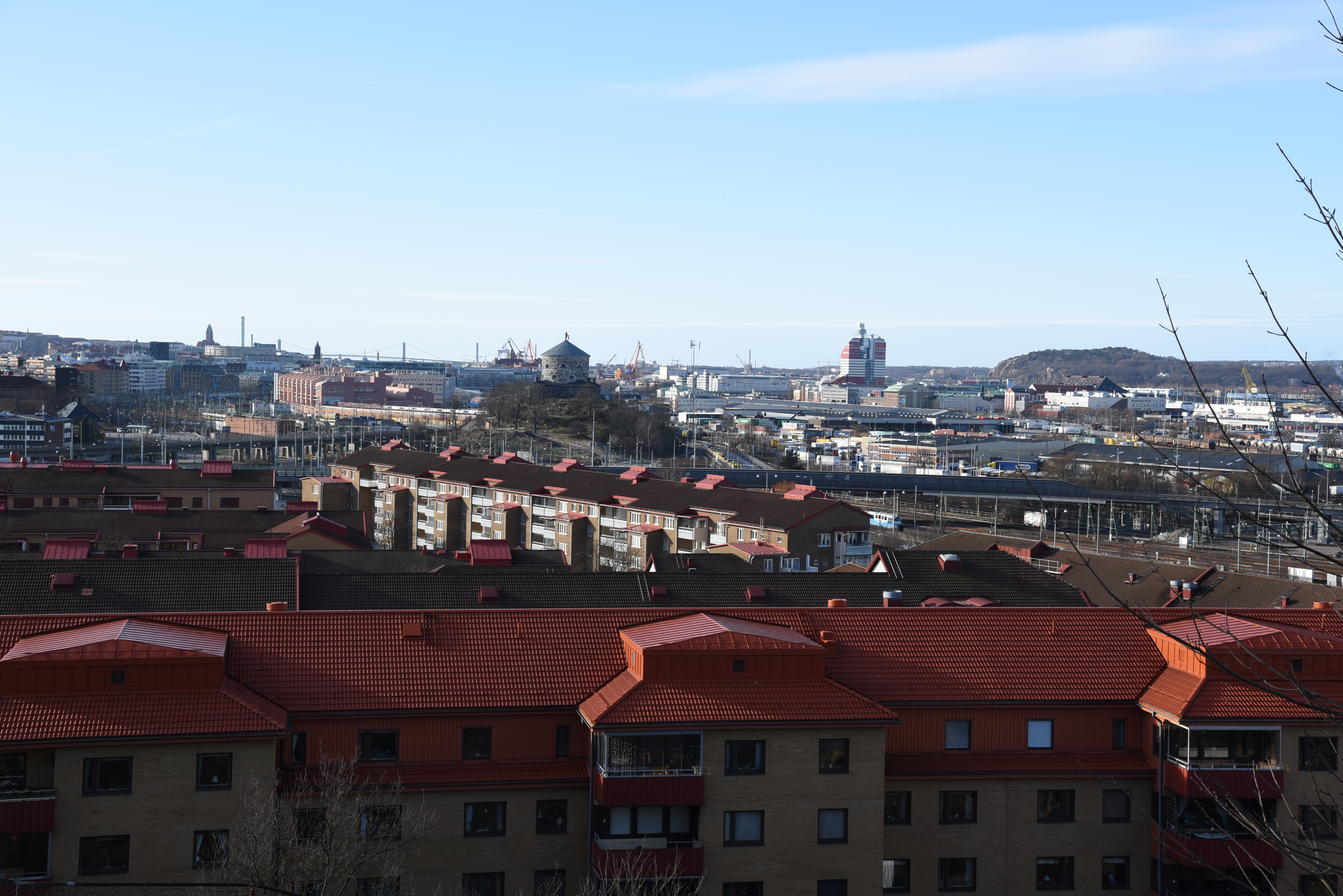 Vy över Olskroken och centrala Göteborg från Redbergsparken.